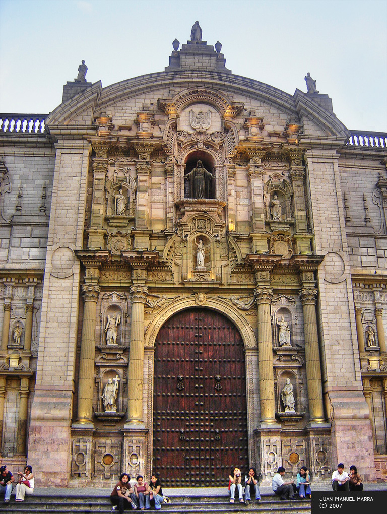 Portada central de la Catedral metropolitana de Lima, ésta es de estilo barroco. Puede apreciarse los capiteles corintios de las columnas. En las hornacinas se destacan las imágenes de los apóstoles, que rodean a la gran imagen de Jesucristo. ghdfgsdgsdfgsdfgawrfdfasdfshgcjhjkljultyukryjghnvcbnvbcvd